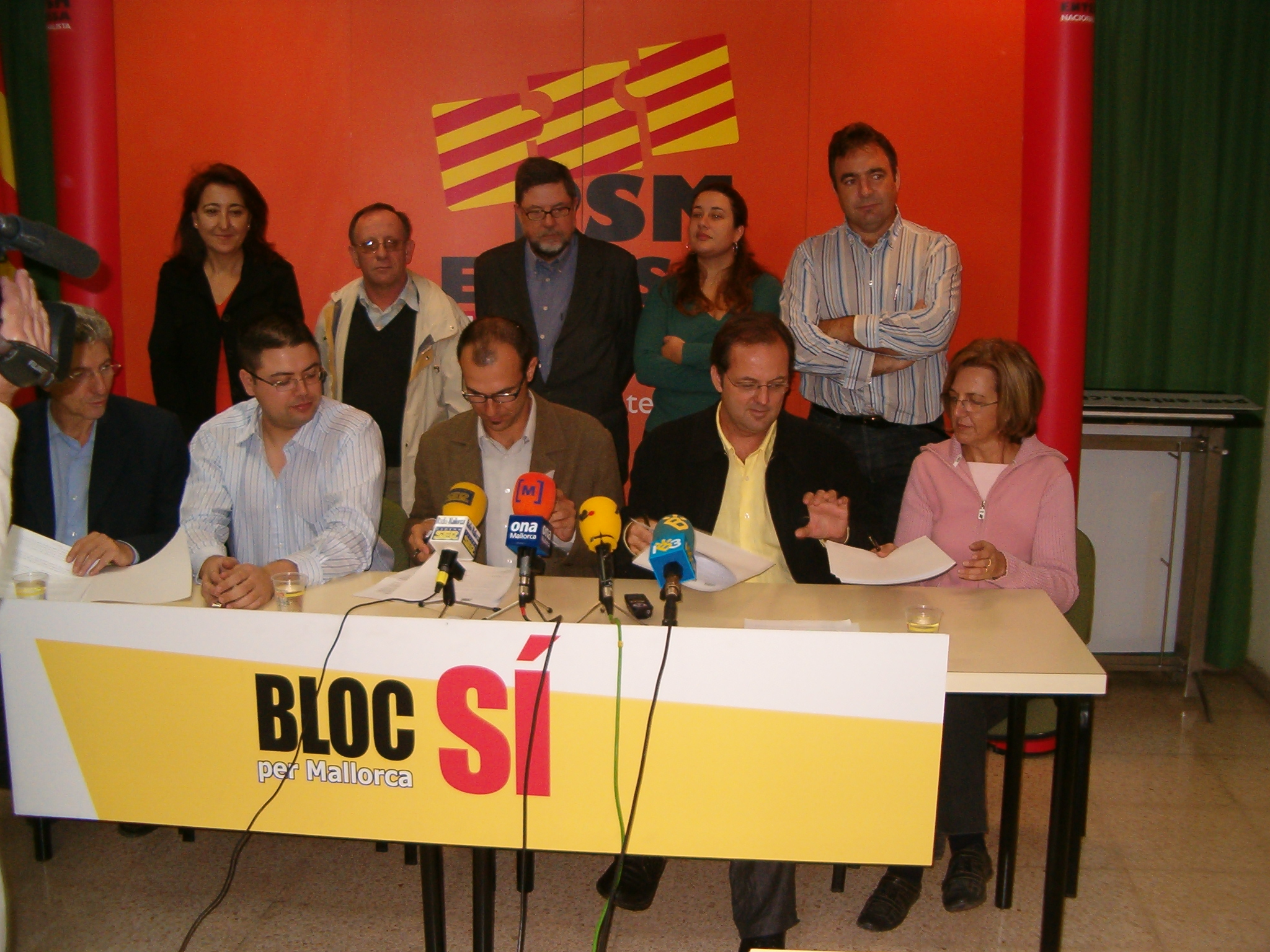 Firma del acuerdo de constitución del Bloc per Mallorca.